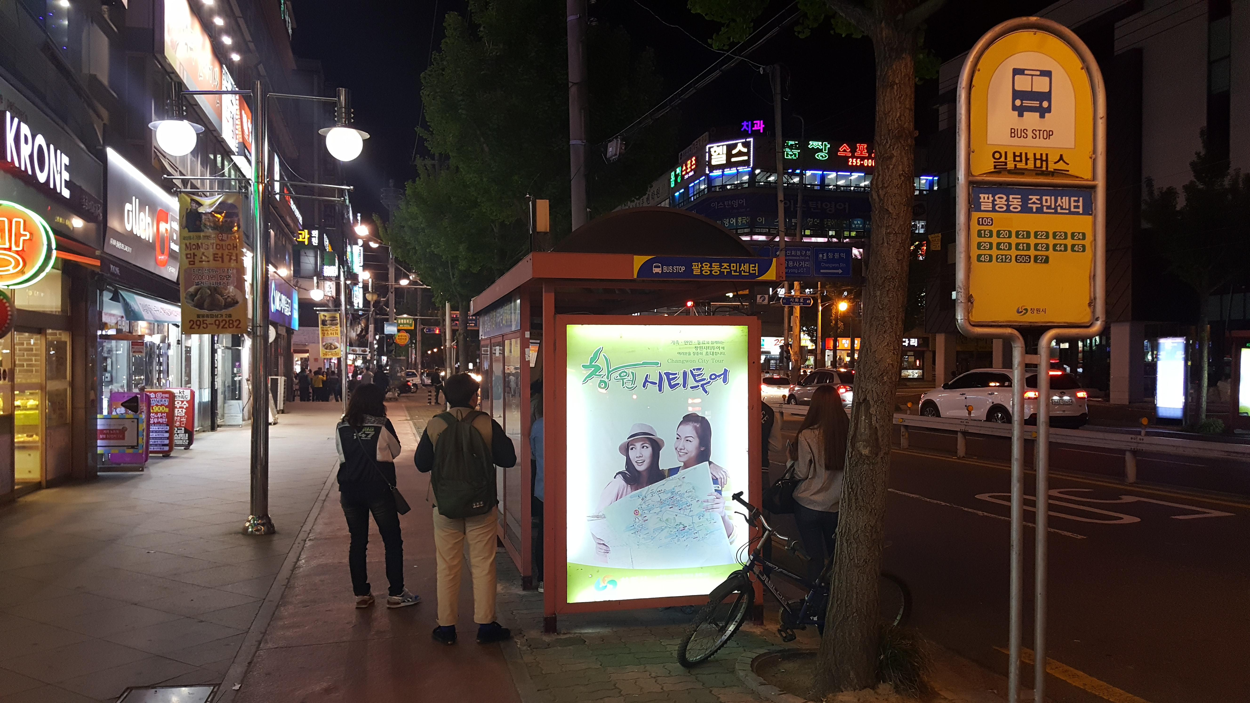 2016년 4월 팔용동주민센터 버스정류장